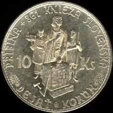 10 Slovak koruna (1944) - reverse